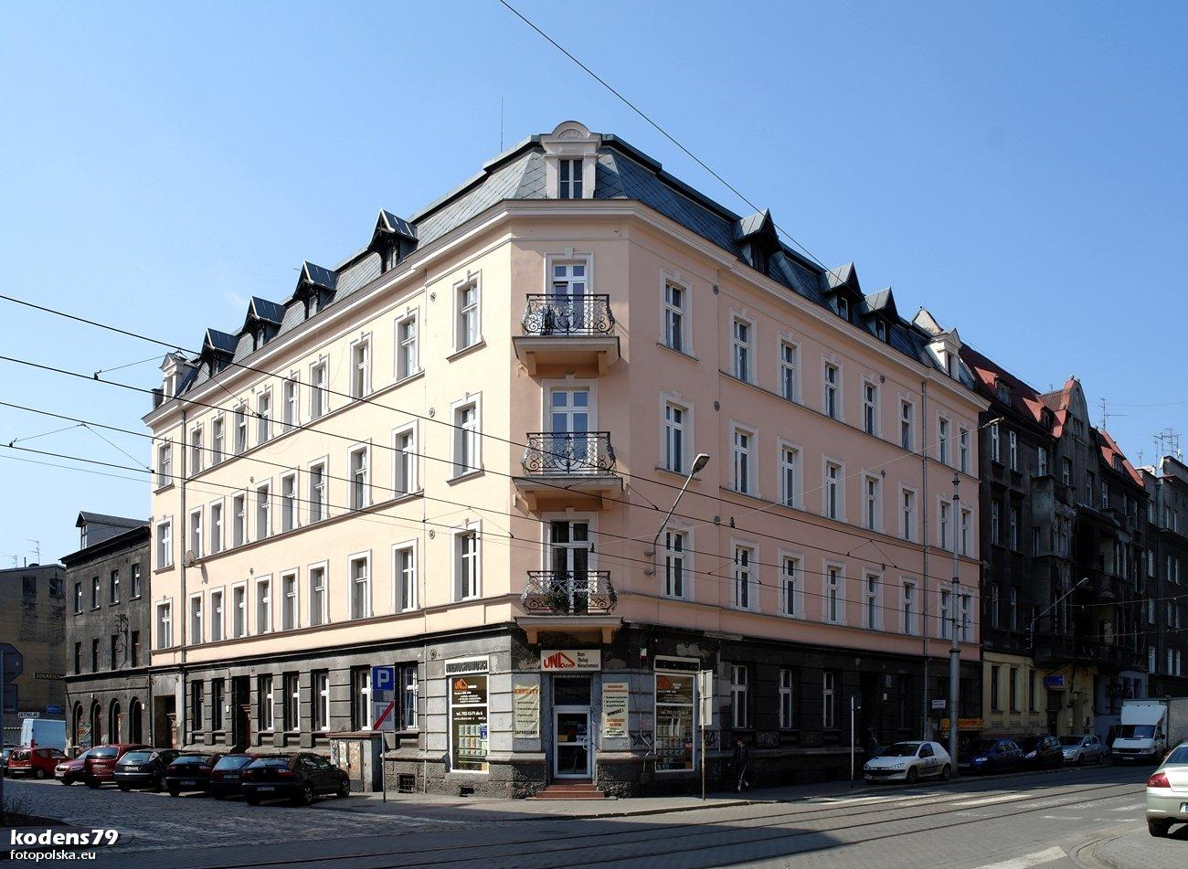 Ulica Gliwicka 8 w Katowicach